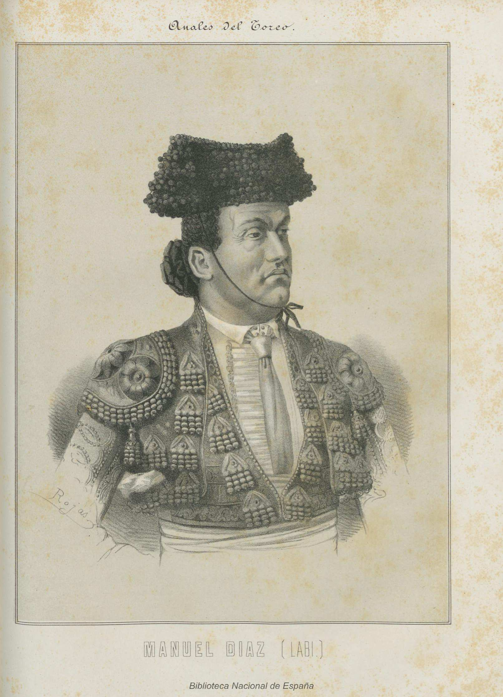 Manuel Díaz, Labi, litografía de Rojas. Ilustración de Anales del toreo: reseña histórica de la lidia de reses bravas: galería biográfica de los principales lidiadores: razón de las primeras ganaderías españolas, sus condiciones y divisas obra escrita por José Velázquez y Sánchez; e ilustrada por reputados artistas, Madrid, 1888.